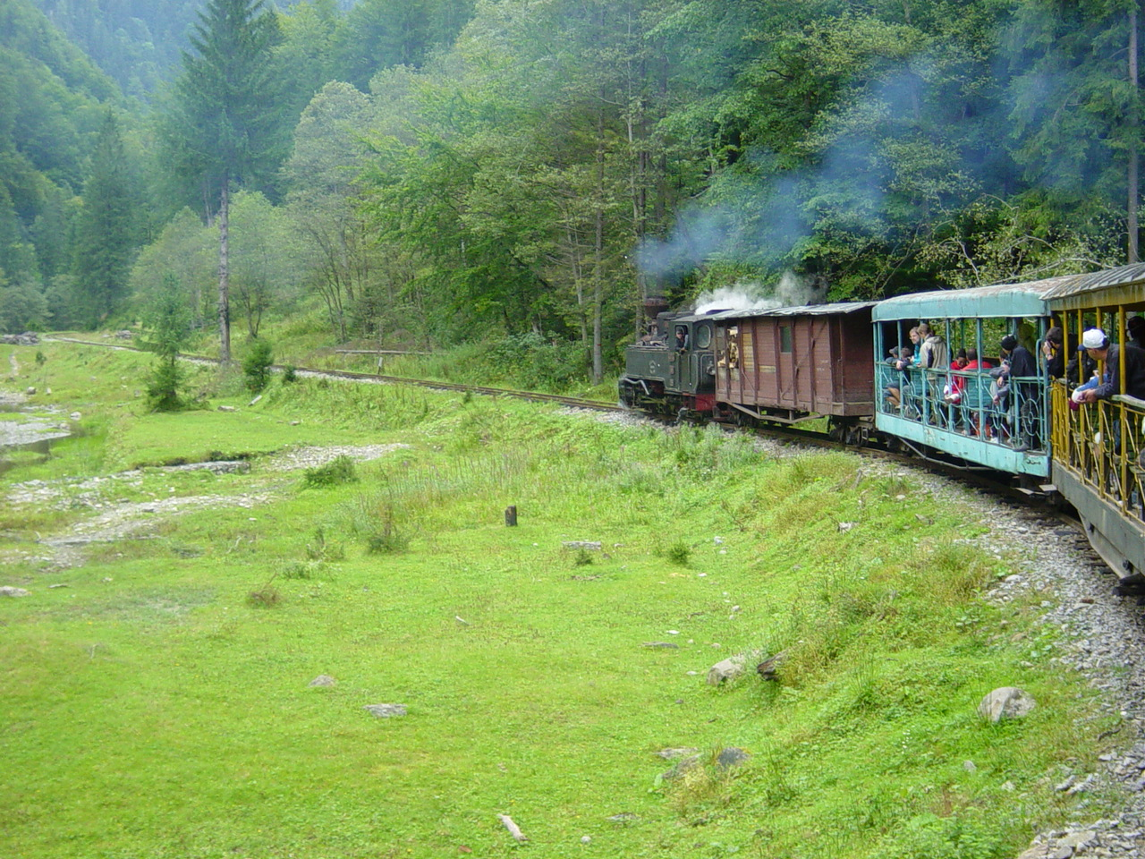 Wassertal